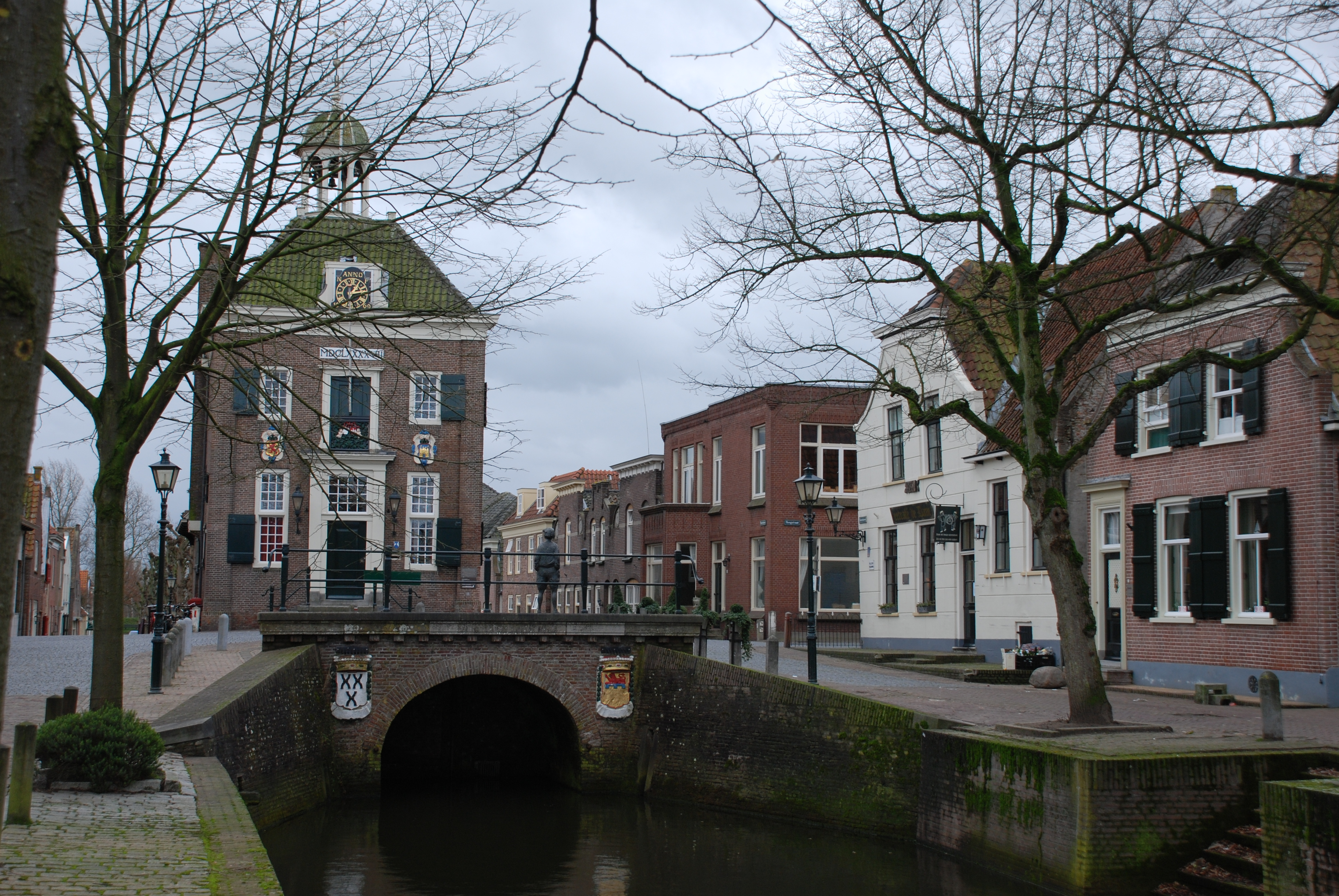 Noordzijde van het Stadhuis te Nieuwpoort.